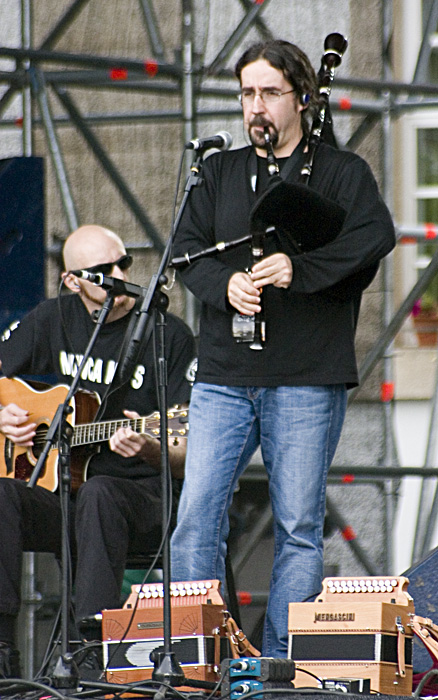 Luar na lubre ensaiando antes dun concerto no Festival do Mundo celta de Ortigueira.